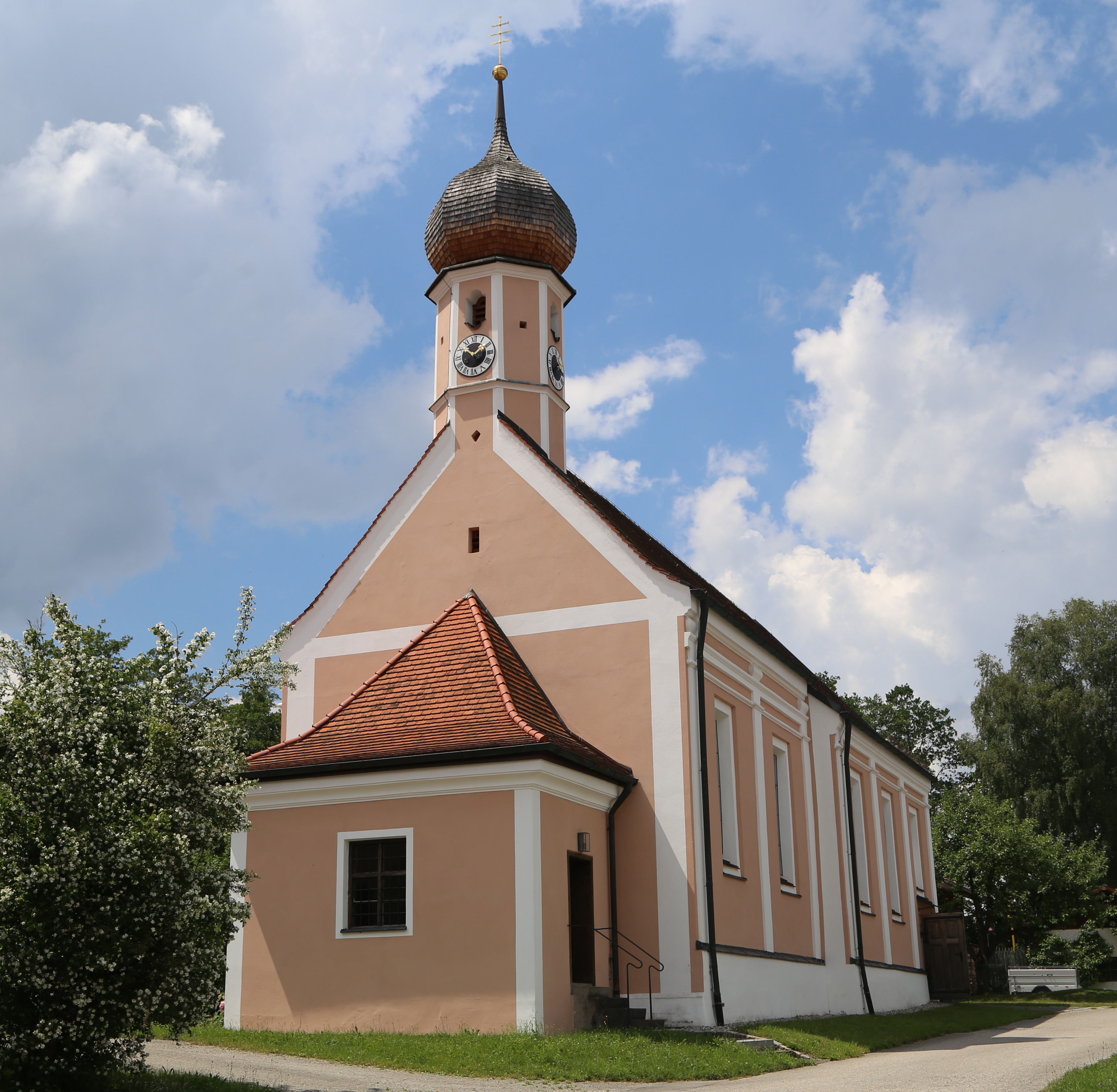 Thann, Großkarolinenfeld; Katholische Filialkirche Hl. Kreuz, Saalbau mit Dachreiter und Zwiebelturm, Chor ehemals das Langhaus der ersten Wallfahrtskapelle, Langhaus 1702, Weihe 1709; mit Ausstattung